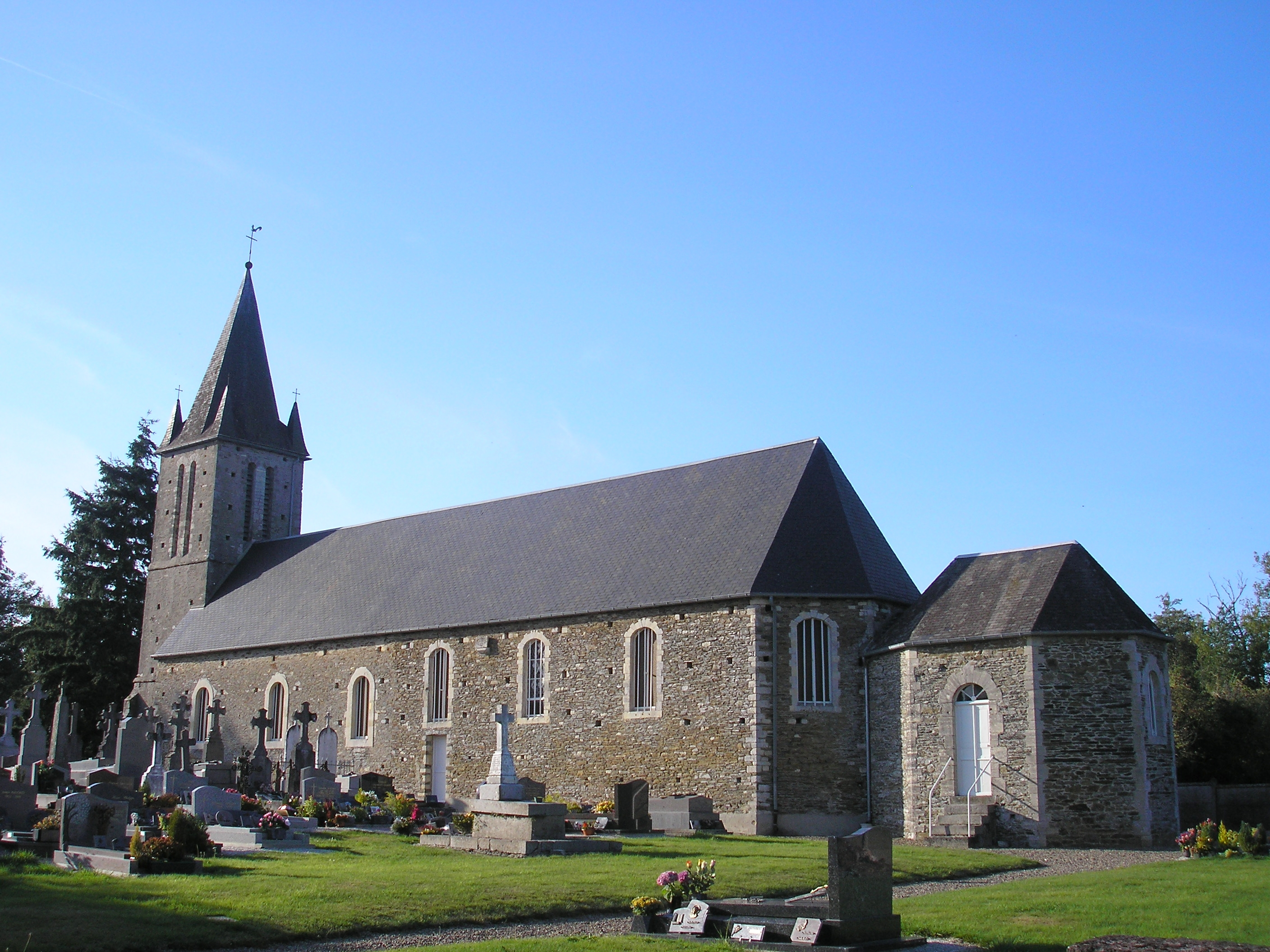 Lamberville (Normandie, France). L'église Saint-Jean.